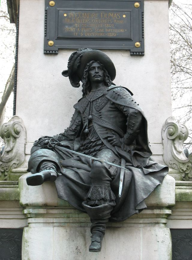 Памятник Александру Дюма в 17-м округе Парижа, пл. генерала Катру (Catroux), вид сзади, постамент украшен персонажами романов Дюма, с этой стороны — самый знаменитый из них — д'Артаньян.